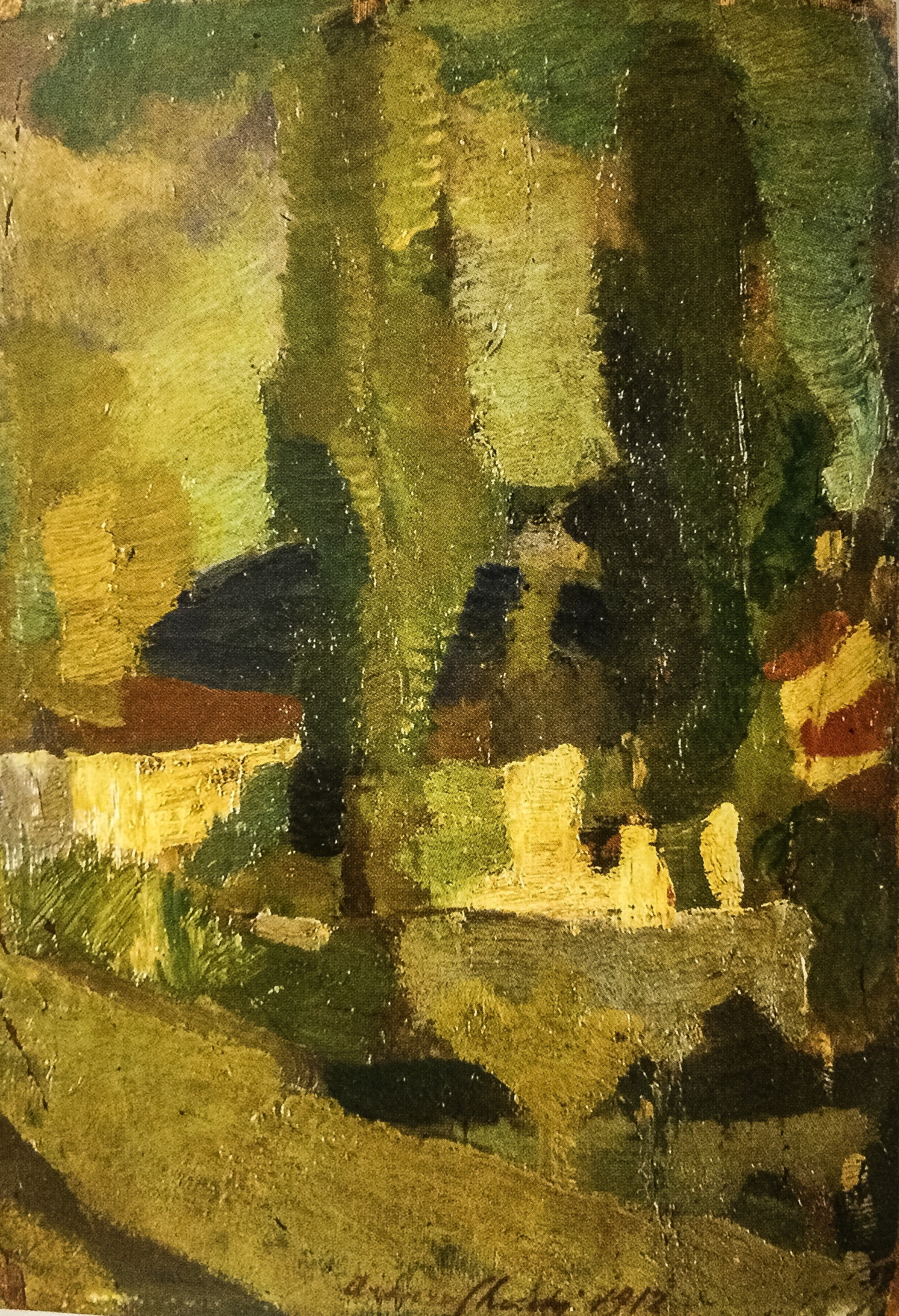 1912, Fondazione Montanelli-Bassi